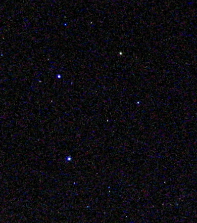 Recadrage d'une photo du ciel austral sur la Croix du Sud / Crux.